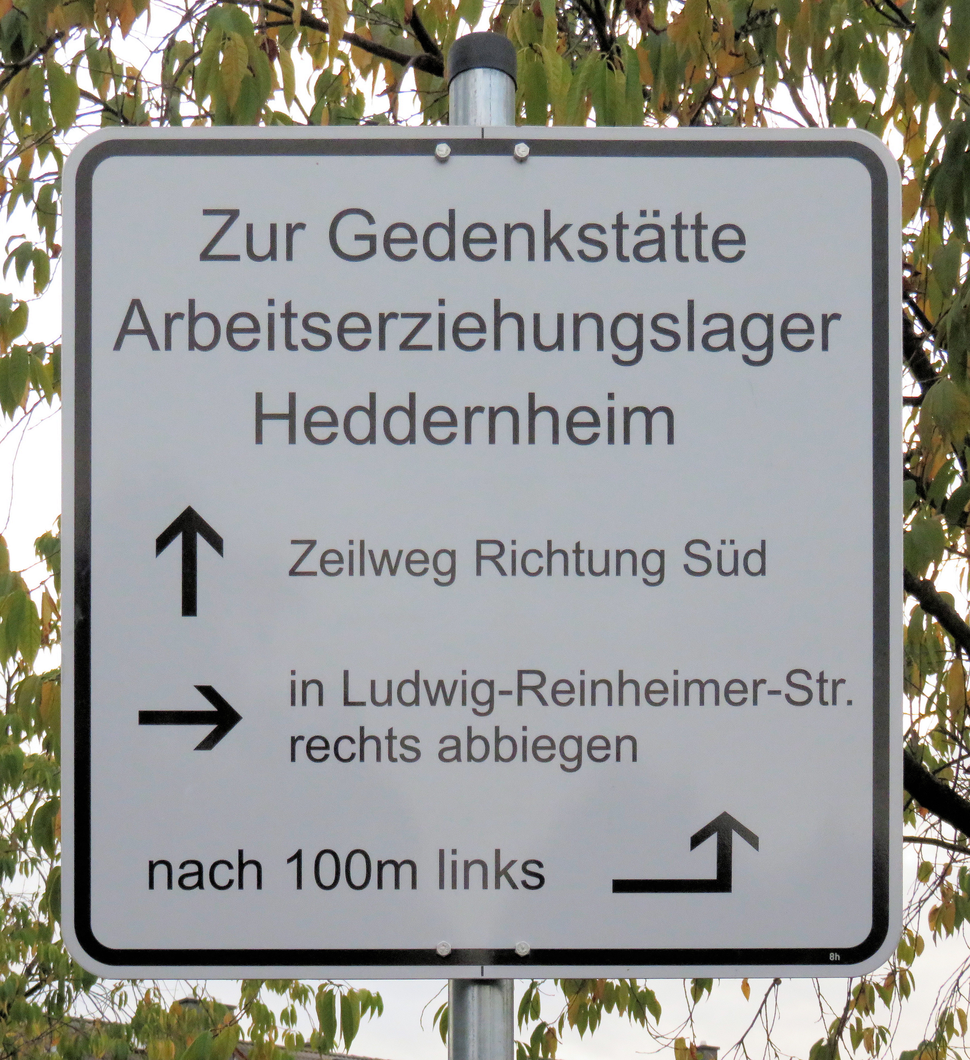 Arbeitserziehungslager in Frankfurt-Heddernheim, Hinweisschild an der U-Bahn-Station Zeilweg